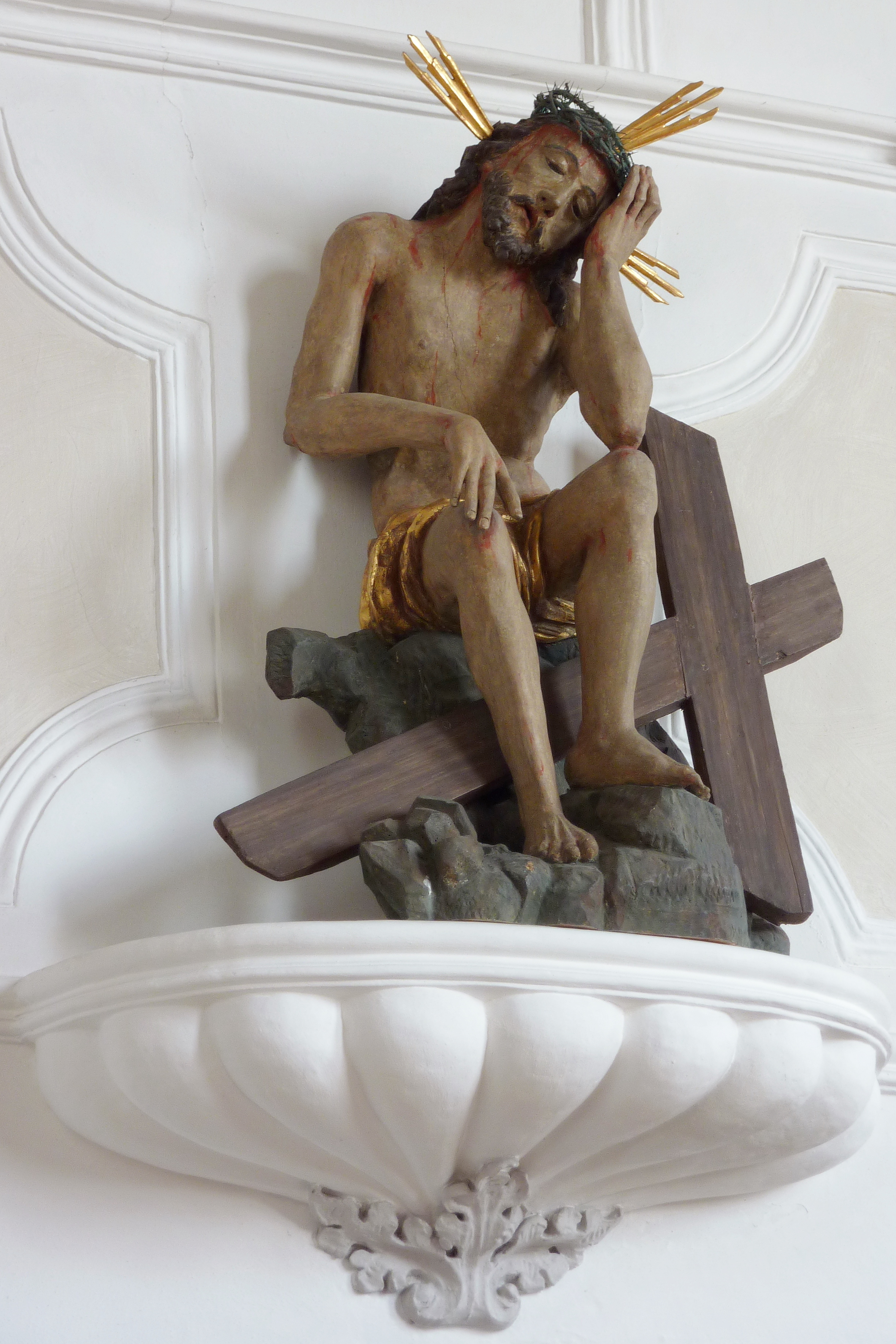 Katholische Pfarrkirche St. Martin in Horgau, einer Gemeinde im Landkreis Augsburg (Bayern), Christus in der Rast, um 1600